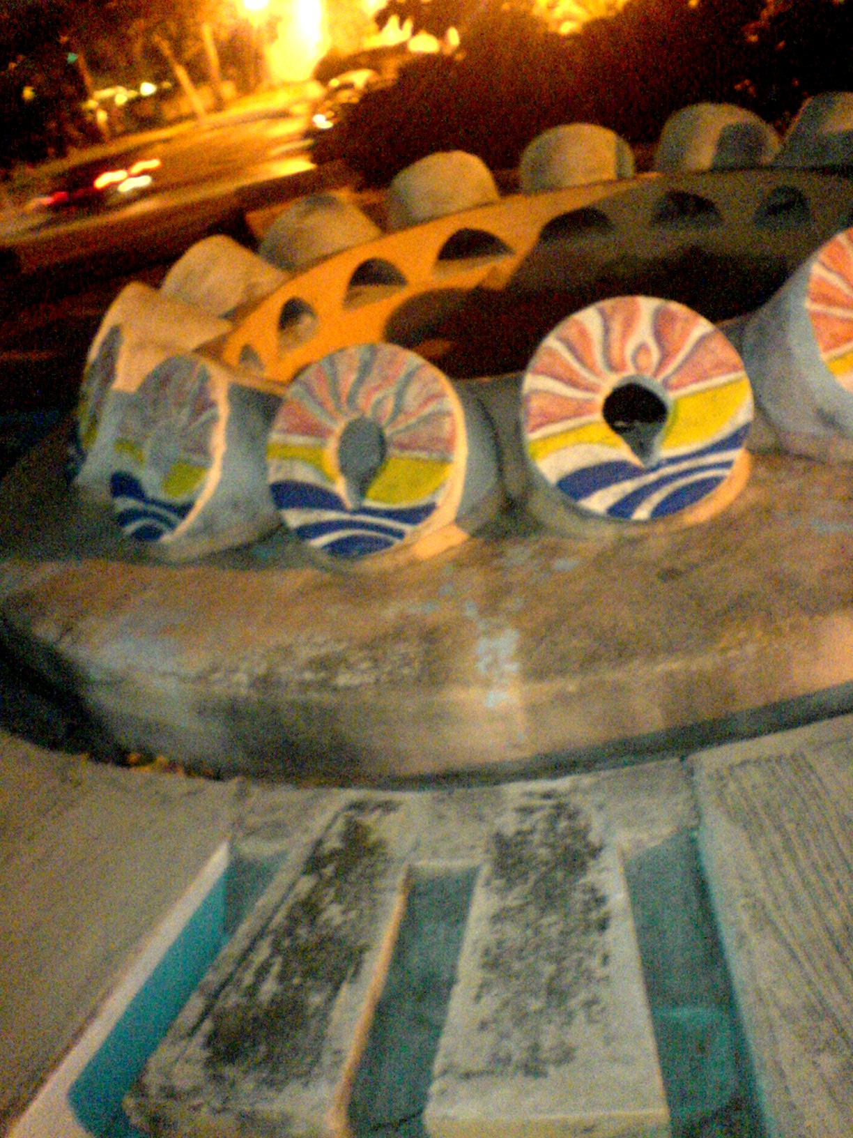 Fuente (no en funcionamiento) dedicada al municipio de Benito Juárez, Av. Cobá, Oficinas de Fonatur, Cancún.